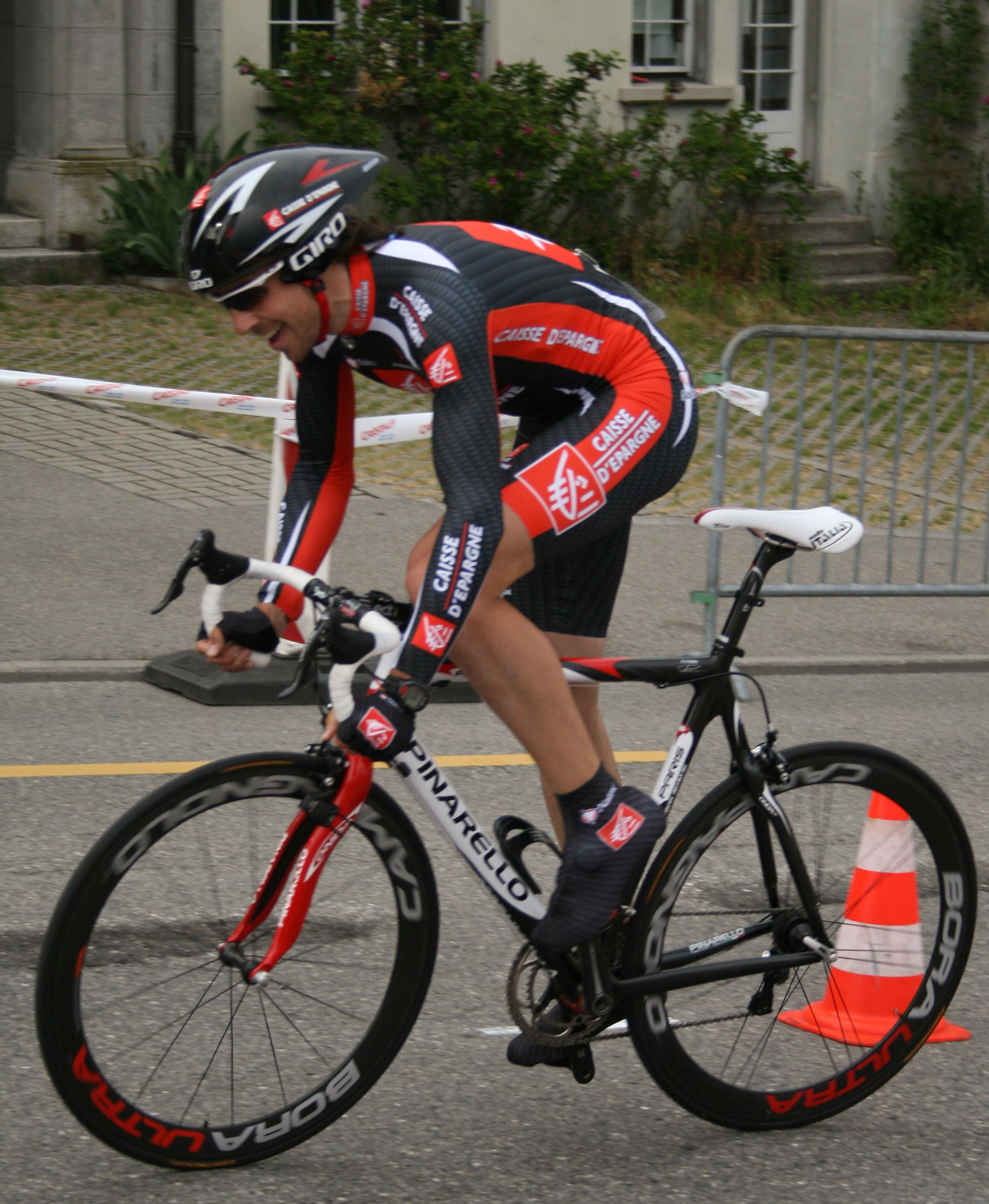 Xabier Zandio Echaide prologue du Tour de Romandie 2007